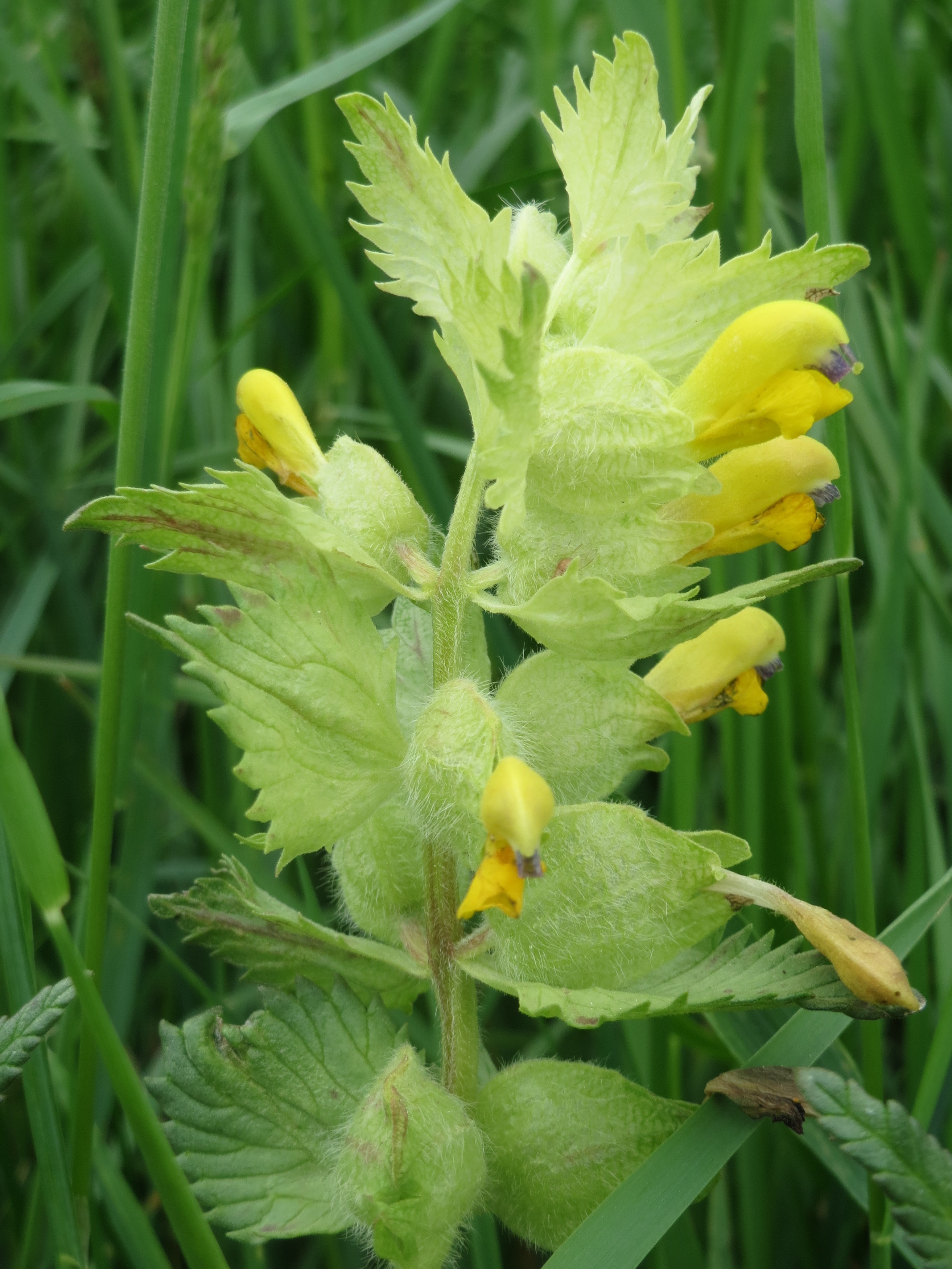 Zottiger Klappertopf (Rhinanthus alectorolophus) im Naturschutzgebiet „Karl-Ludwig-See“ im Landschaftsschutzgebiet „Hockenheimer Rheinbogen“